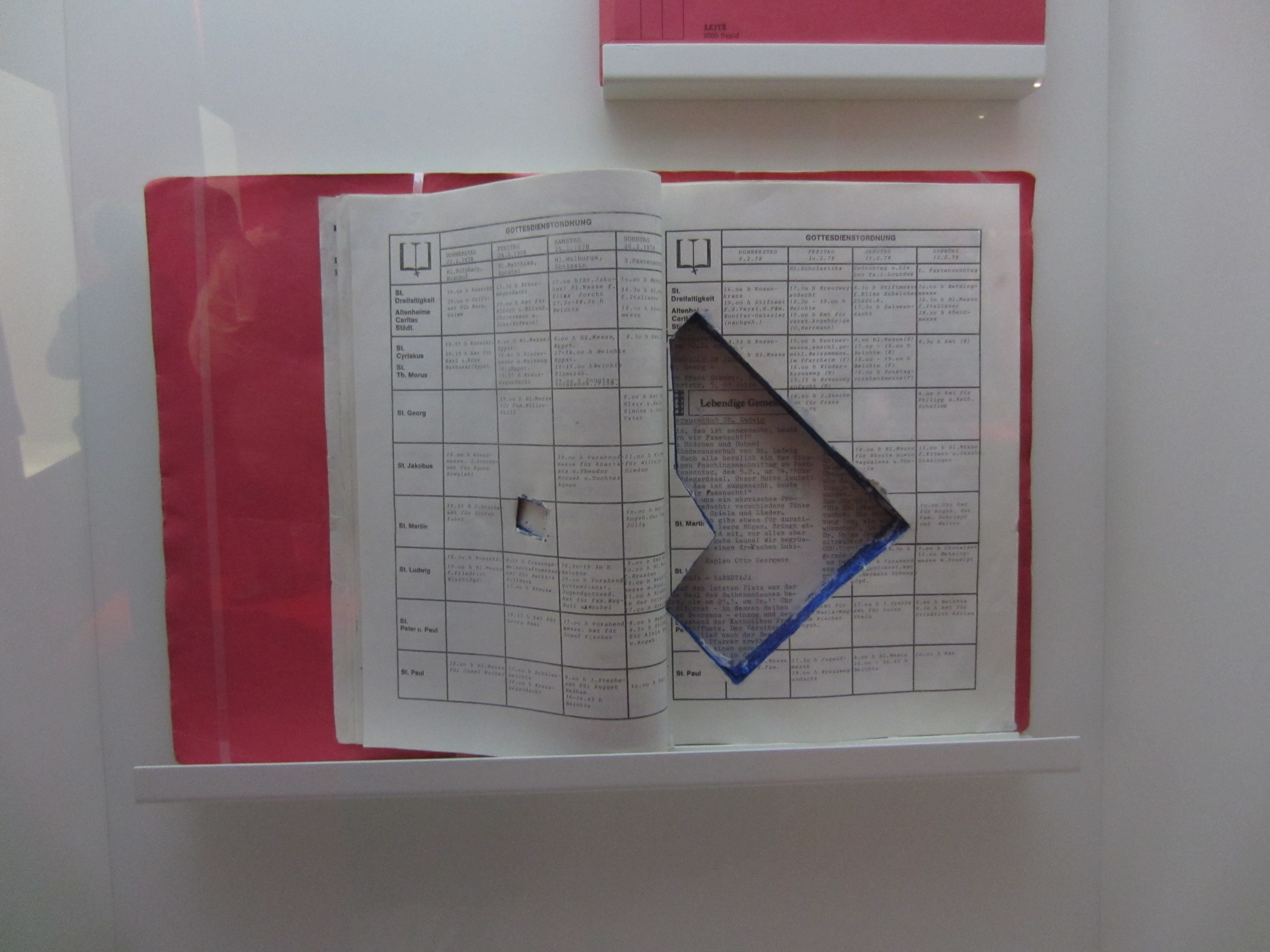 Versteck für Pistole in Akten während der Stammheim-Prozesse. Gezeigt in einer Ausstellung über die RAF in Stuttgart.